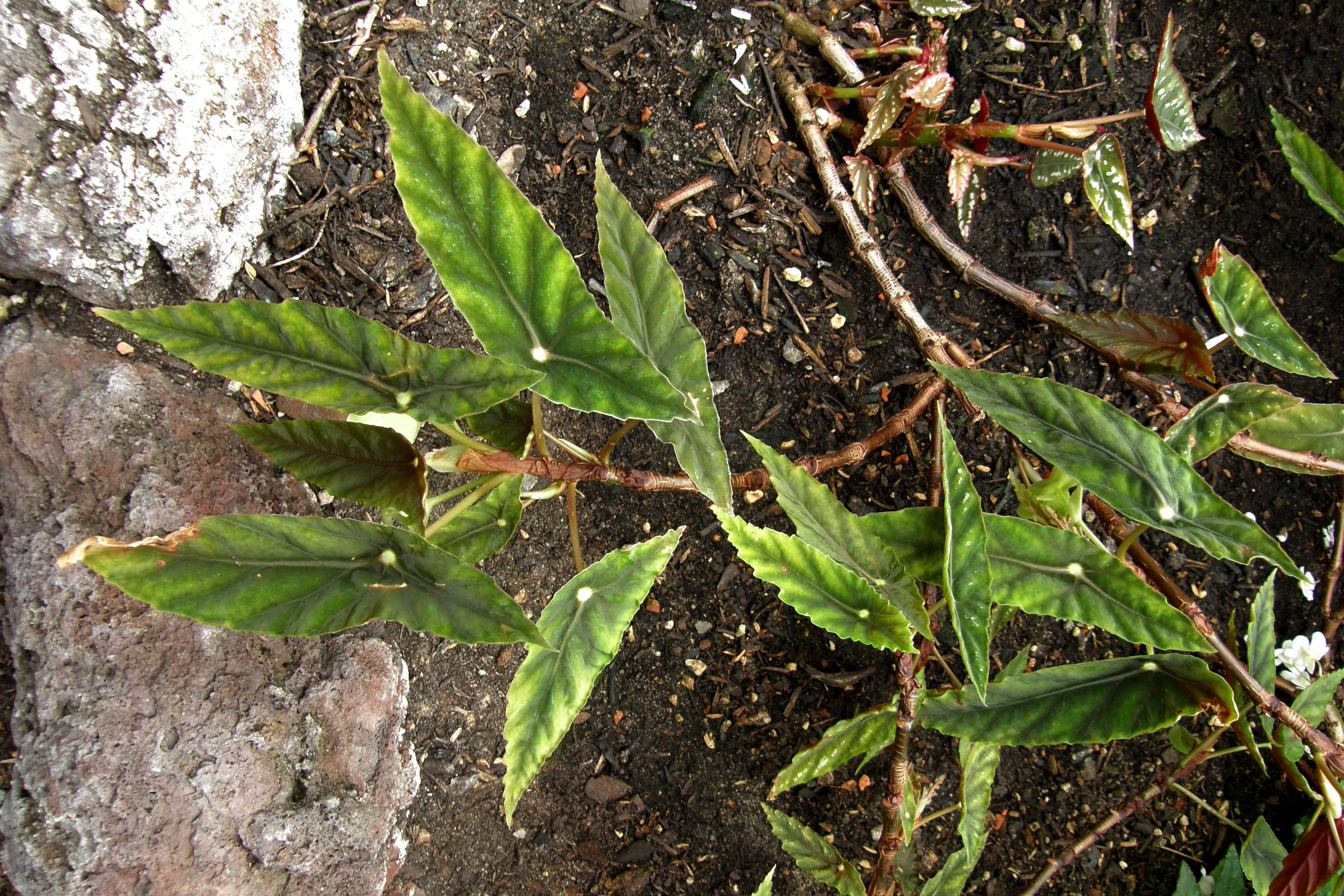 Begonia lubbersii E.Morren dans la serre du Botanischer Garten de Berlin-Dahlem